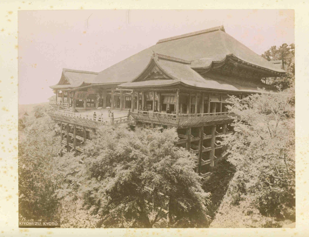 Fotograf: Adolfo Farsari (Nagasaki ID 4245). “Kiyomizu, Kyoto”. (einbelichteter Original-Titel). Kiyomizu-dera, Haupthalle (Kyoto). Schwarzweißes Albumin-Foto ca. 1880 (es wurden bei diesem Abzug eine Hausspitze und ein Baumwipfel entfernt). Foto: 19 x 24 cm quer (aufgezogen auf Karton: 27 x 35 cm quer).